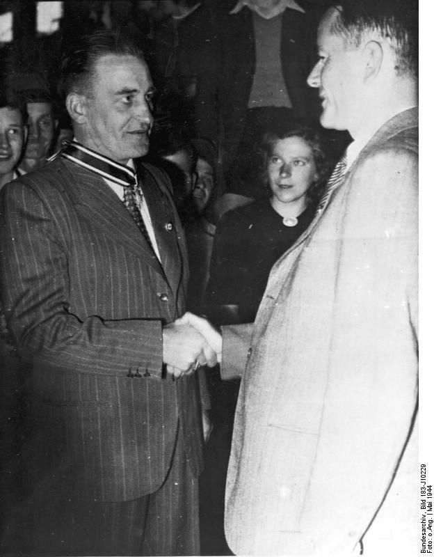 Männer der Rüstung: Der ehemalige Reichsminister [Albert] Speer [rechts] spricht dem mit dem Ritterkreuz [des Kriegsverdienstkreuzes] ausgezeichneten Direktor [Edmund] Geilenberg seine Glückwünsche aus. Zentralbild 31.5.44 [Herausgabedatum]